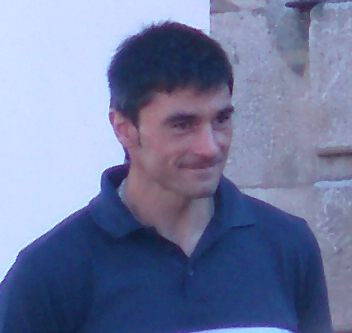 Manuel Busto en el Festival de la Sidra de Villaviciosa 01/09/2007